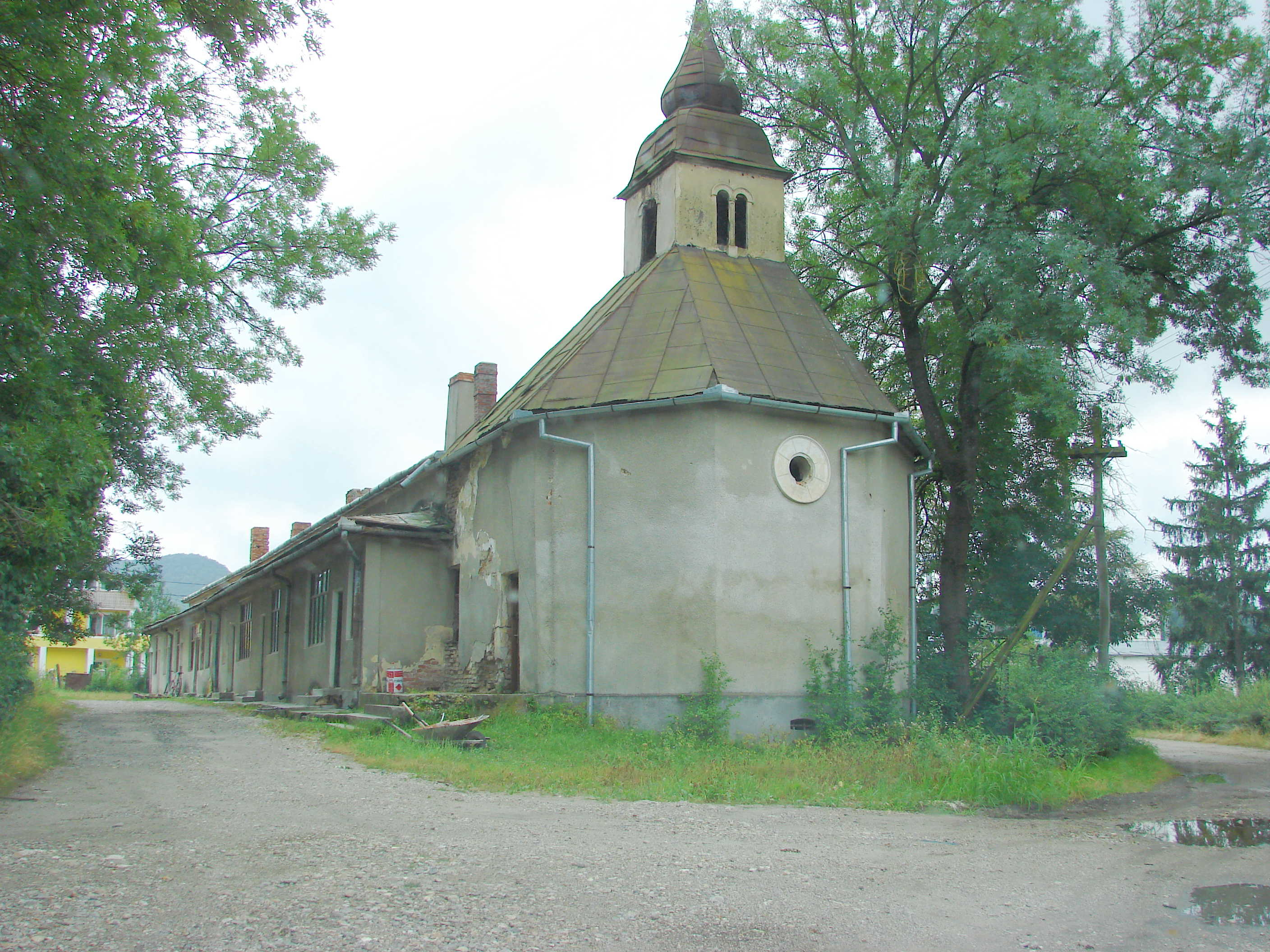 Poza 2